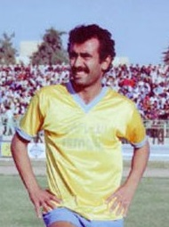 محمد حازم